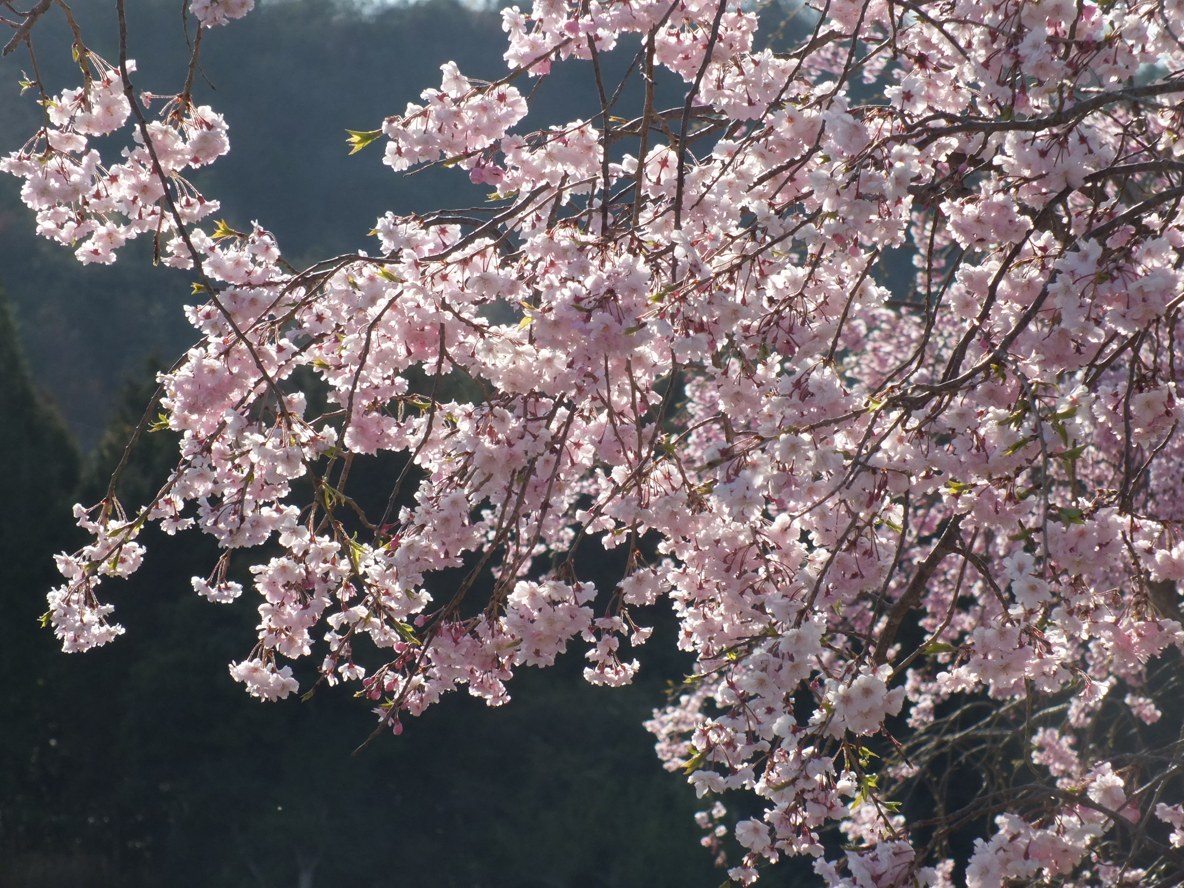 Kasai Tamaoka Historic Park 玉丘史跡公園